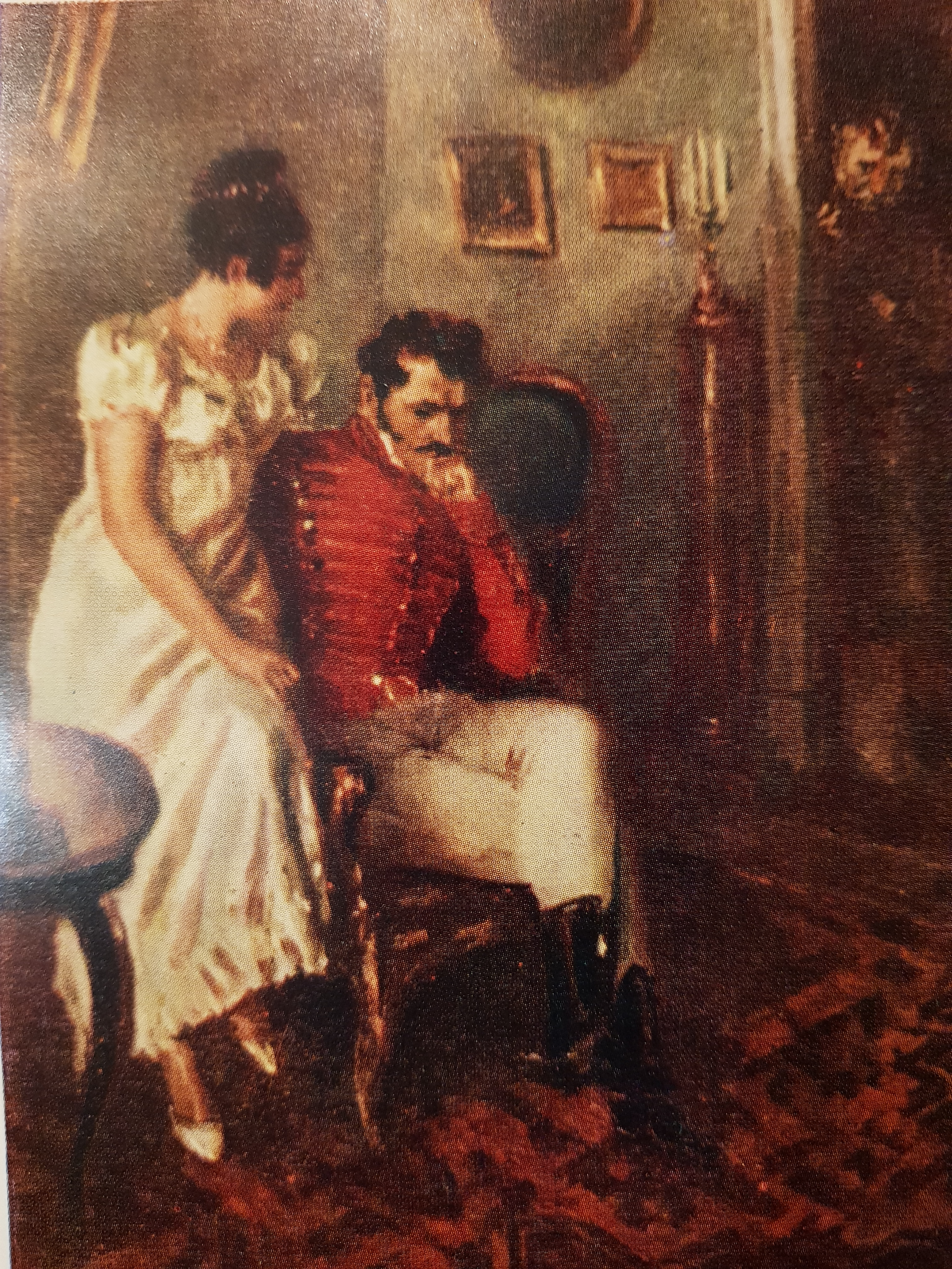 Иллюстрация к произведению А.С.Пушкина "Повести Белкина".Год создания 1947 выполненная маслом на картоне